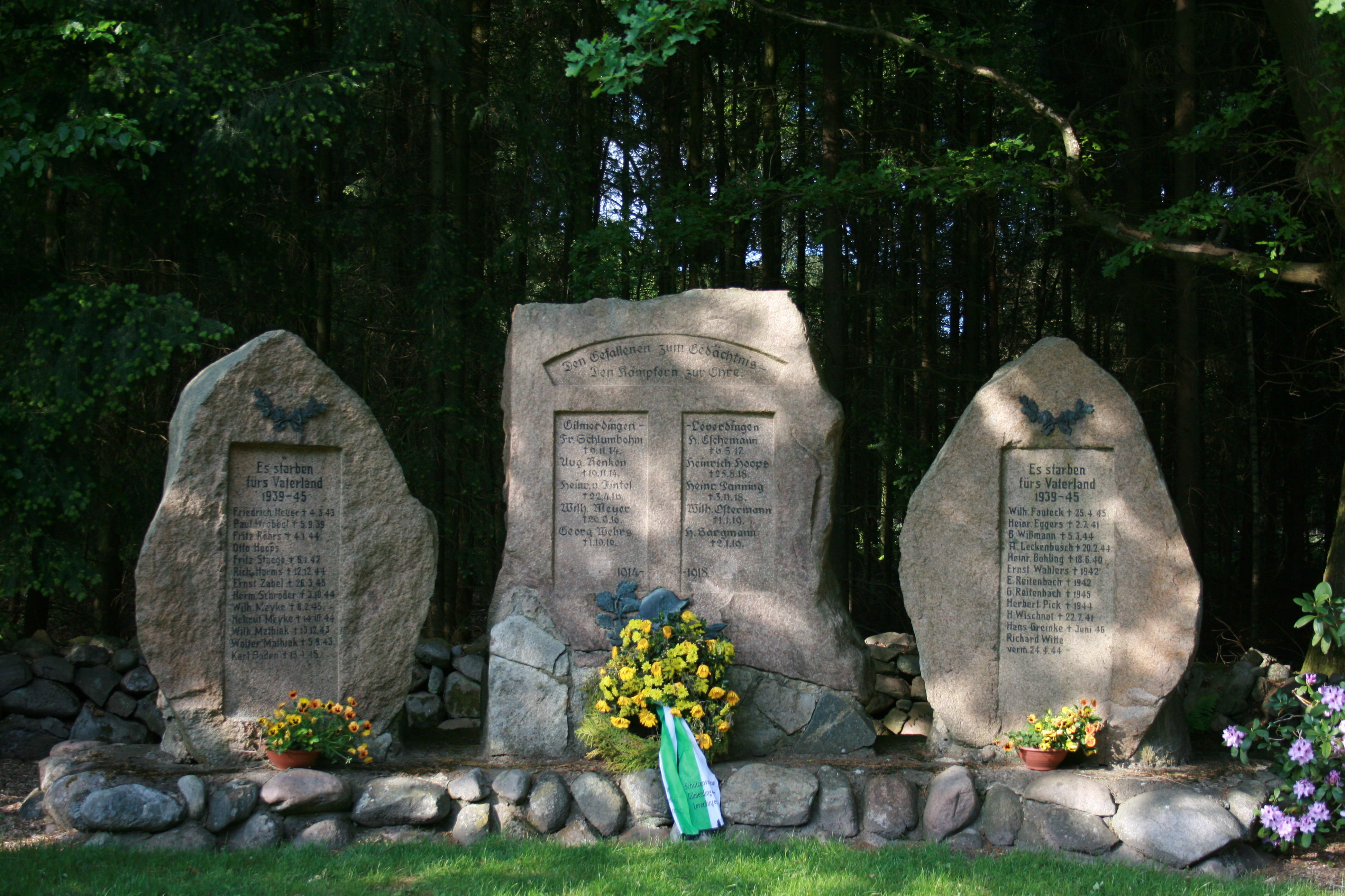 Kreuzungsbereich Soltauer Straße (B71) / Leverdingen (B71) / Gilmerdingen in Neuenkirchen (Lüneburger Heide)